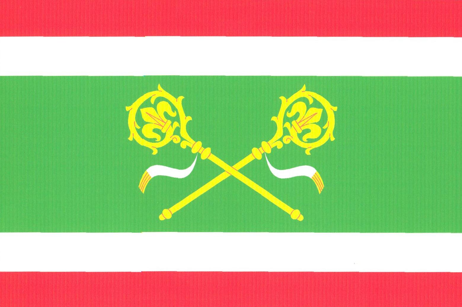 Vlajka obce Světlík (okres Český Krumlov)